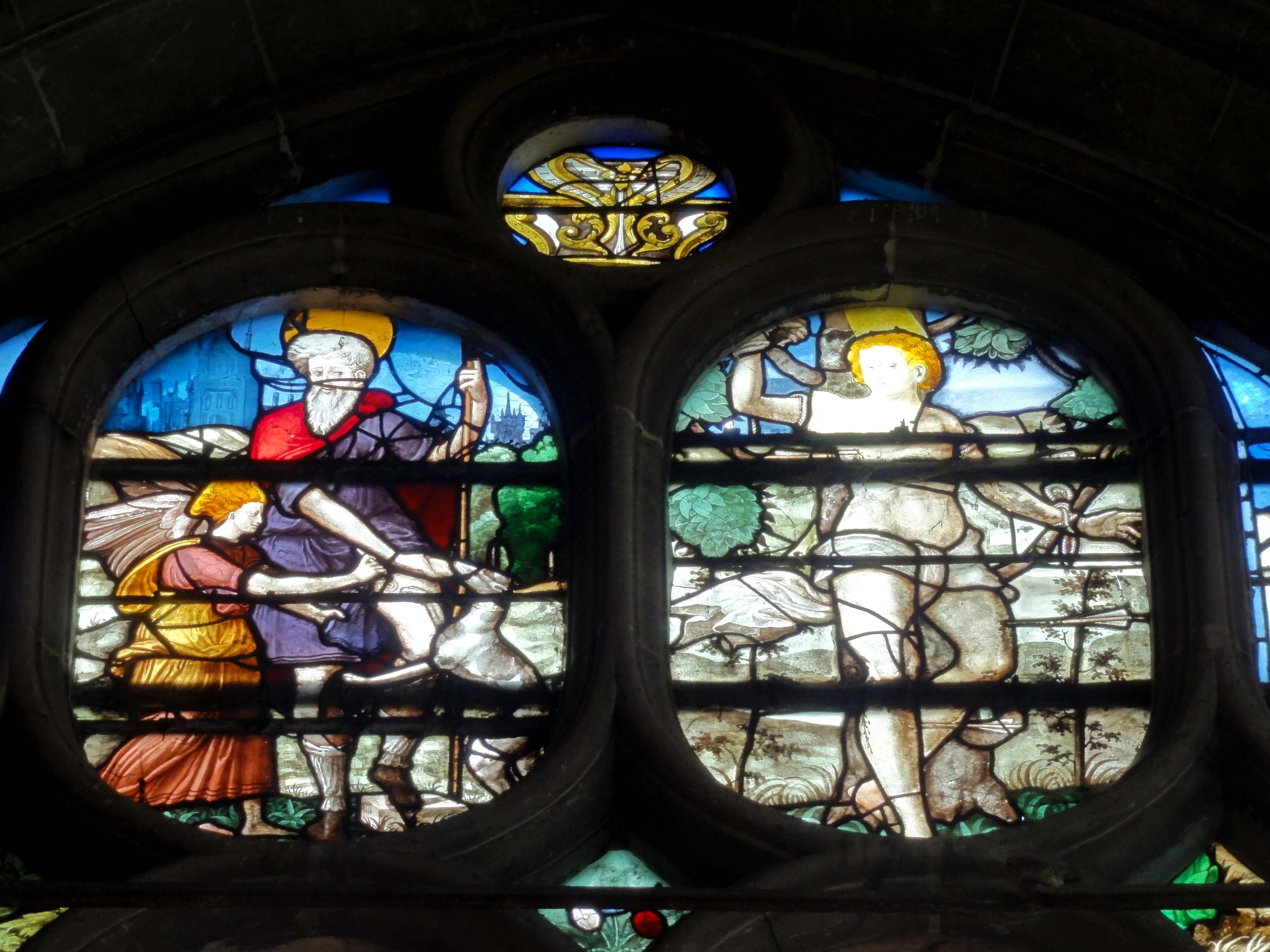 Verrière n° 6, tympan - saint Roch et saint Sébastien, XVIe siècle.